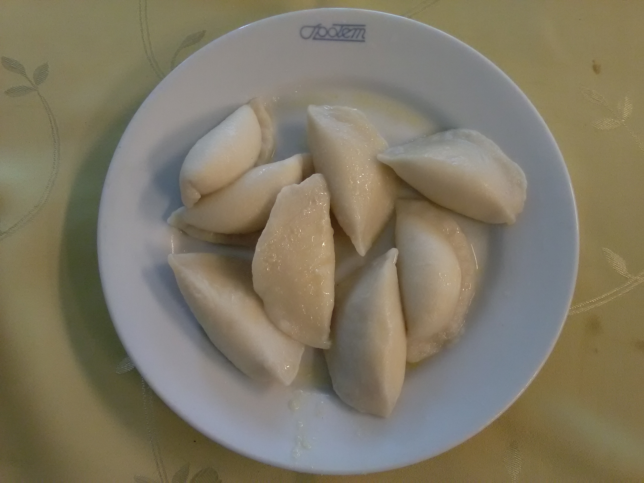 Pierogi z serem na słodko w barze Kmicic na osiedlu Rzeczypospolitej w Poznaniu.